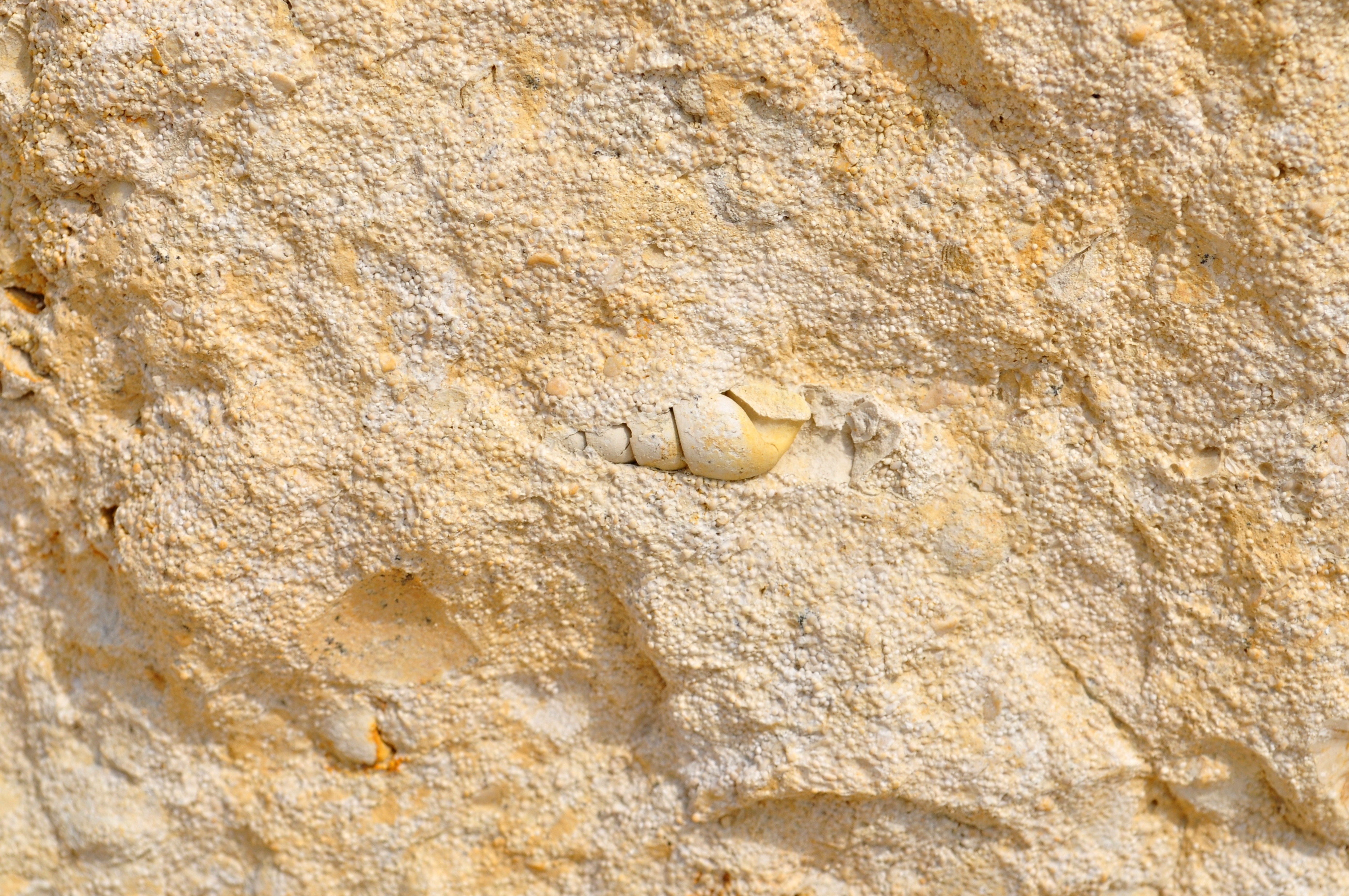 «Протопопівський», Балаклійський район, с. Протопопівка